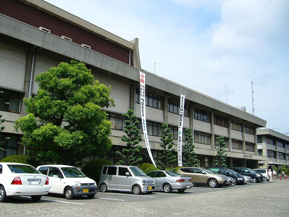 Kadoma City Hall in Osaka-fu, Japan